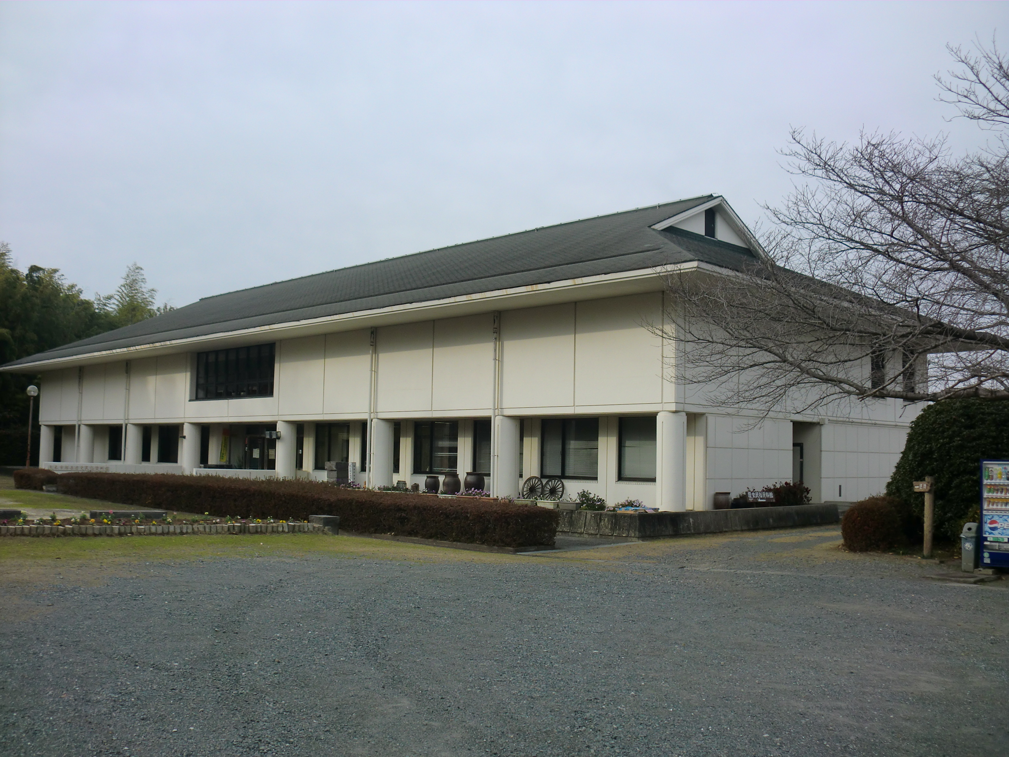 熊本市南区にある熊本市塚原（つかわら）歴史民俗資料館